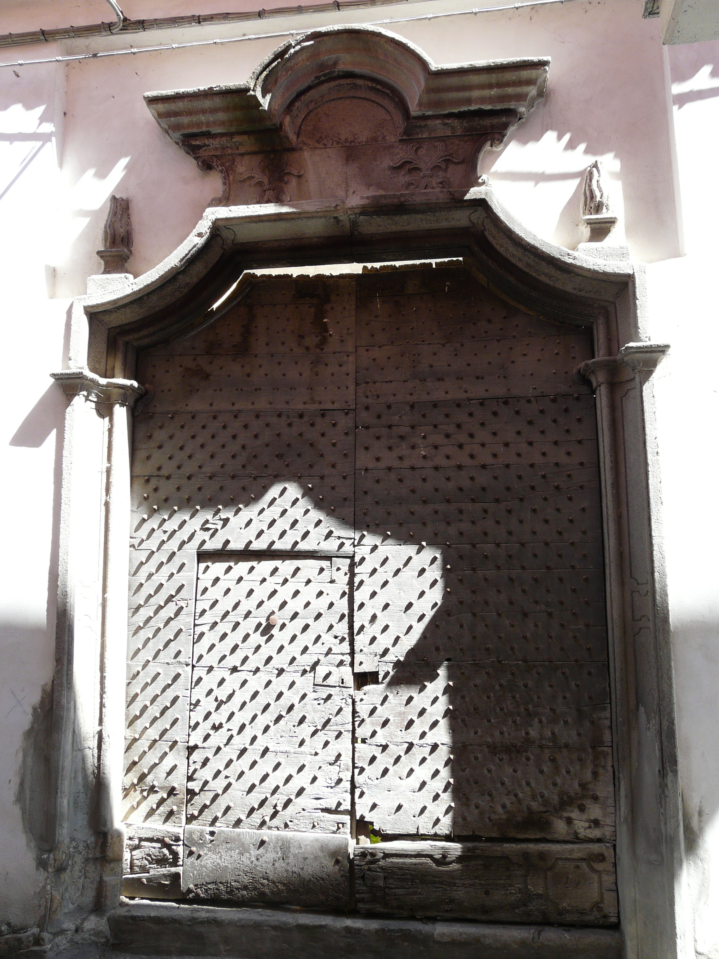 Varzi, Lombardia, Italia